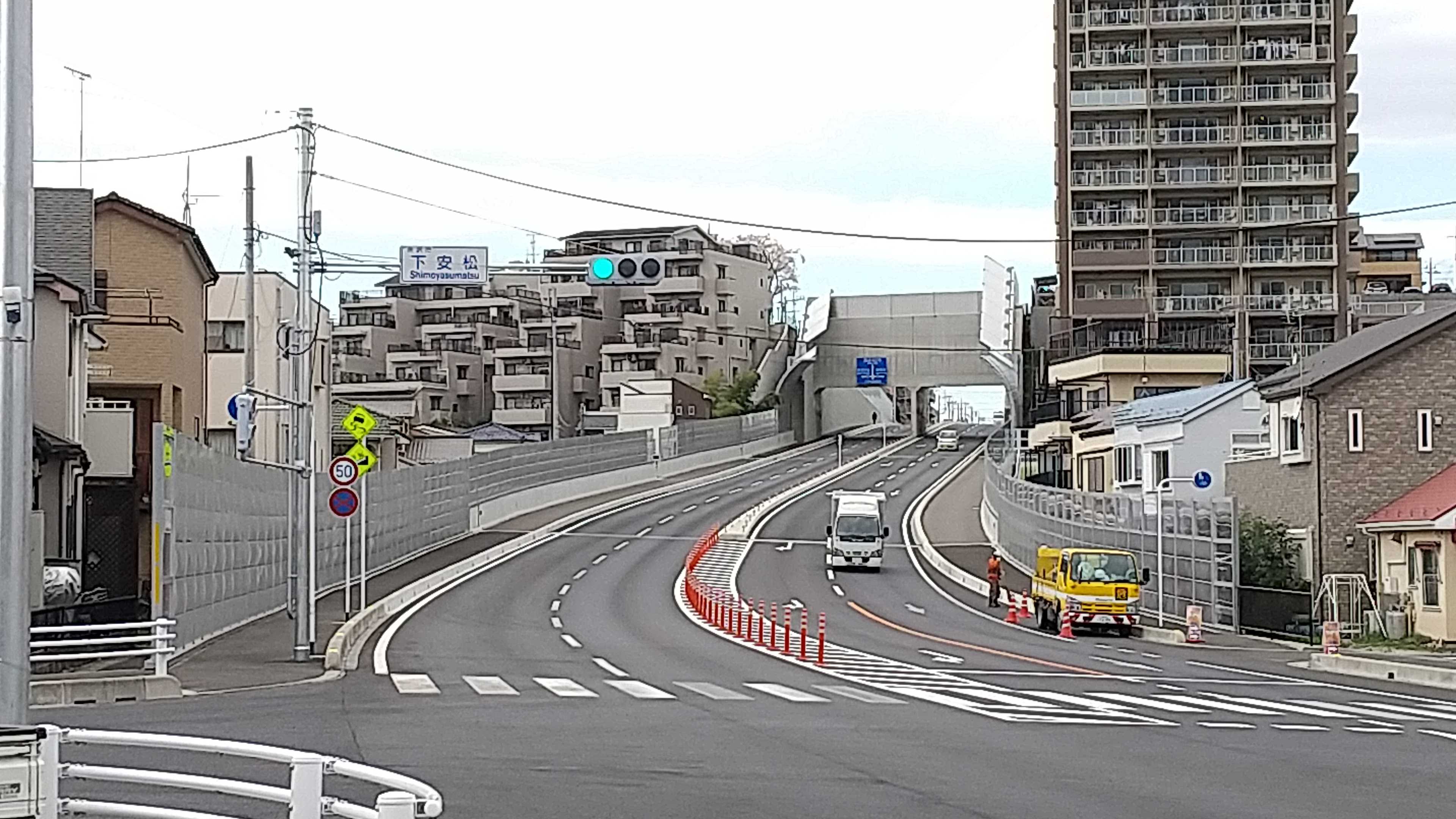 埼玉県所沢市下安松にて